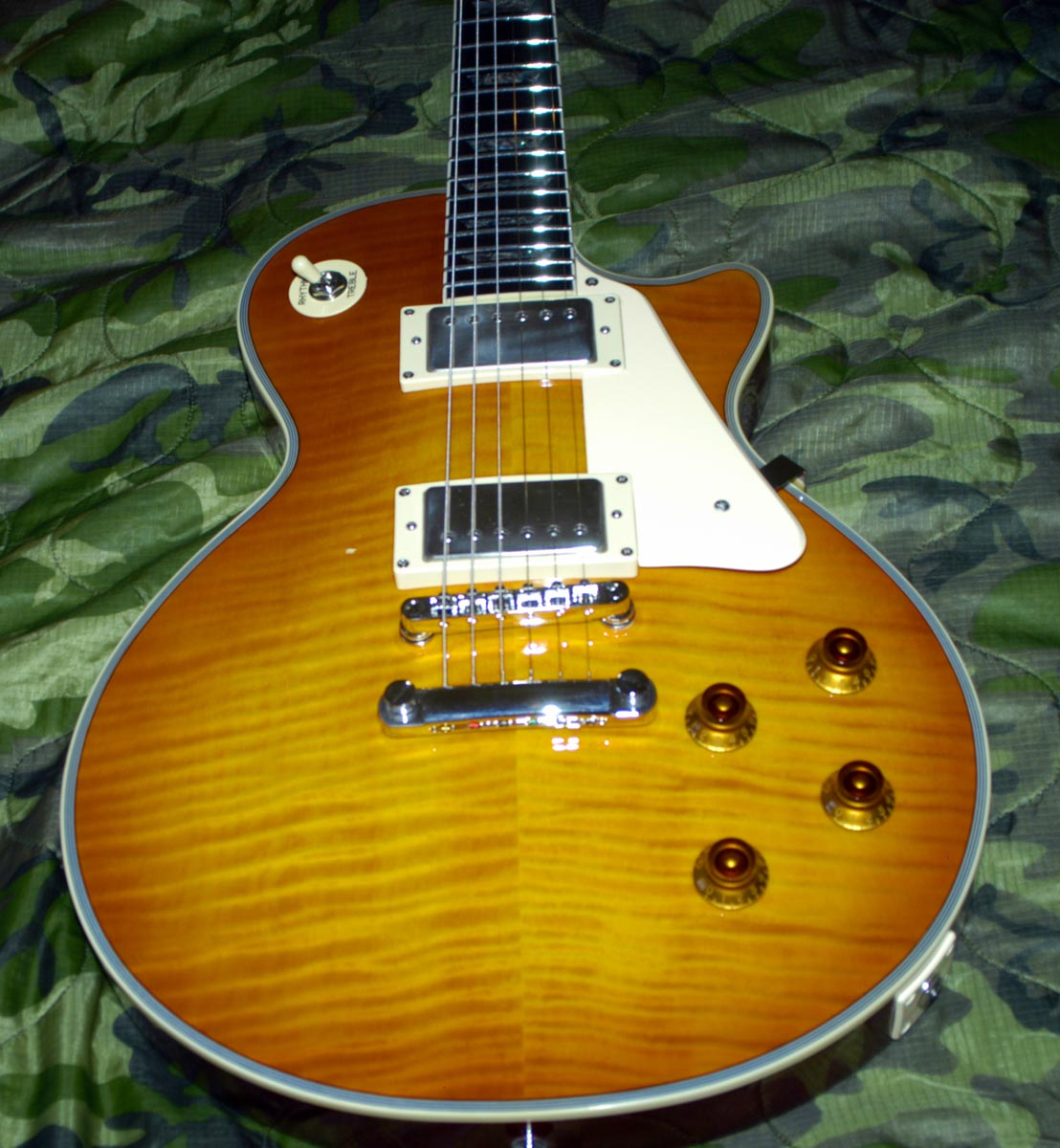 Agile AL-3000 Les Paul clone